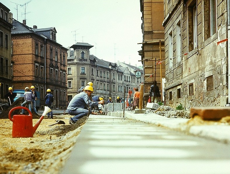 Original image description from the Deutsche FotothekStraßenbauer